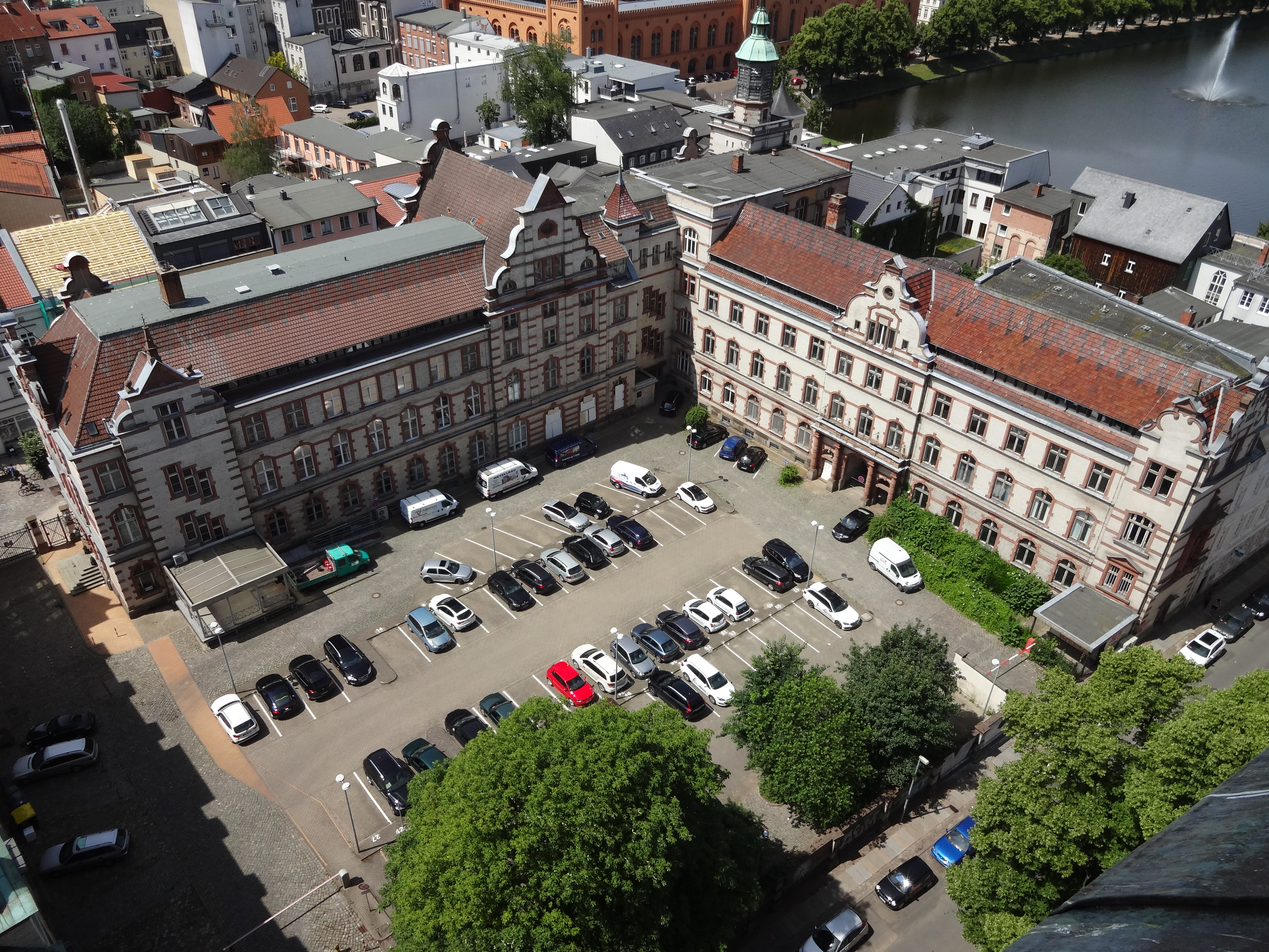 Blick über die denkmalgeschützte Altstadt von Schwerin vom Dom aus im Sommer 2016; Mecklenburgstraße 4/6/8 Hauptpost